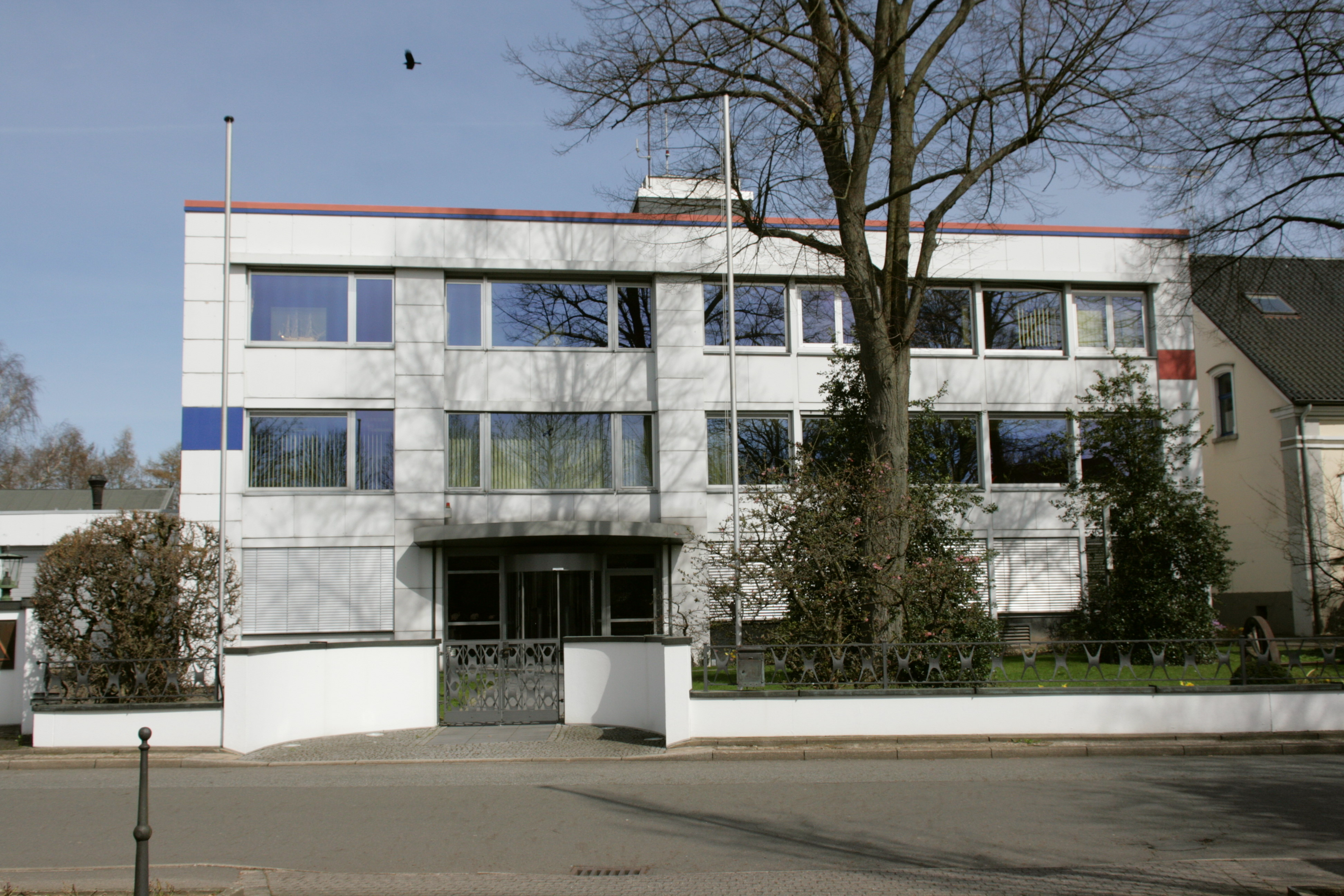 J.D. Neuhaus GmbH & Co. KG in Witten-Heven